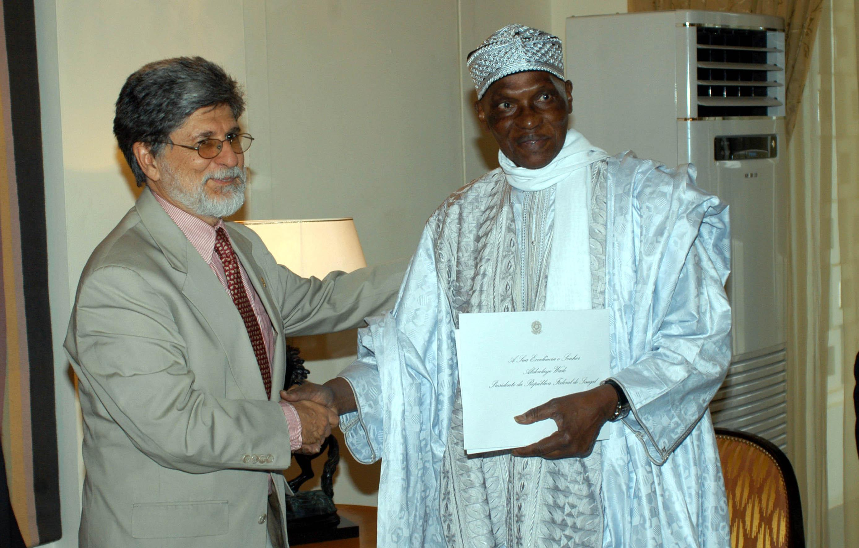 Senegal - O ministro das Relações Exteriores Celso Amorim, cumprimenta o presidente Senegalês, Wade Aboulaye. Foto: Paulo Sant'Ana/MRE